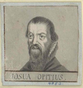 Josua Opitz (1542-1585), deutscher lutherischer (flacianischer) Theologe und Pädagoge; zeitgenössische Darstellung